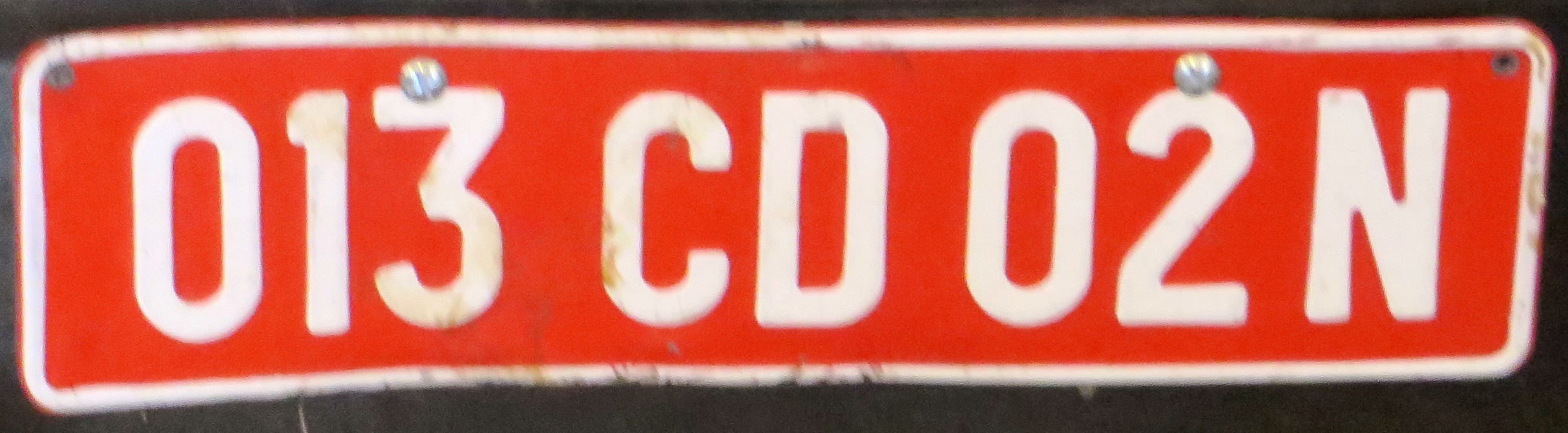 CD plaat Namibië